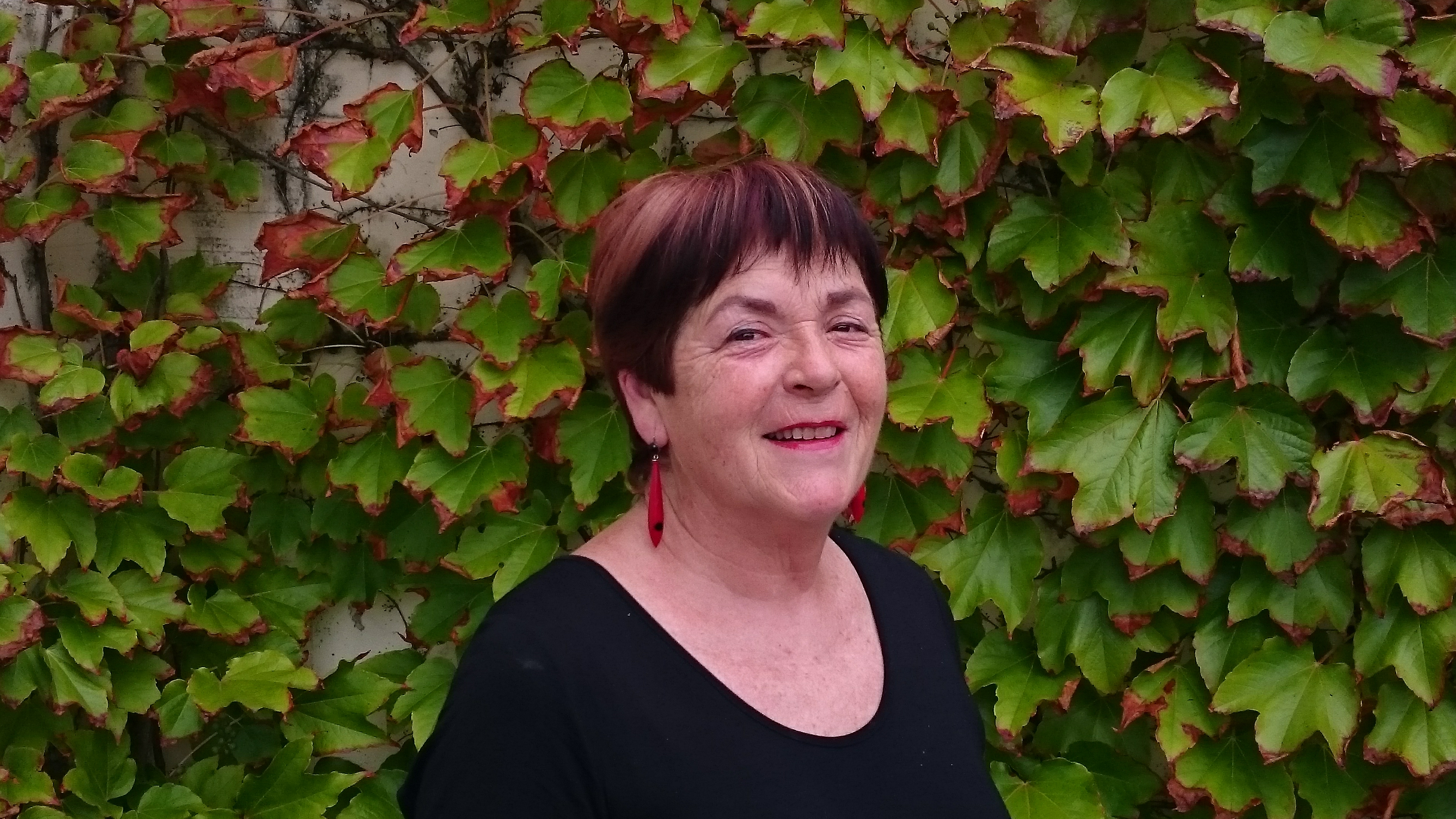 Mariasun Landa idazlearen argazkia. Egilea: Natividad de la Puerta Rueda.